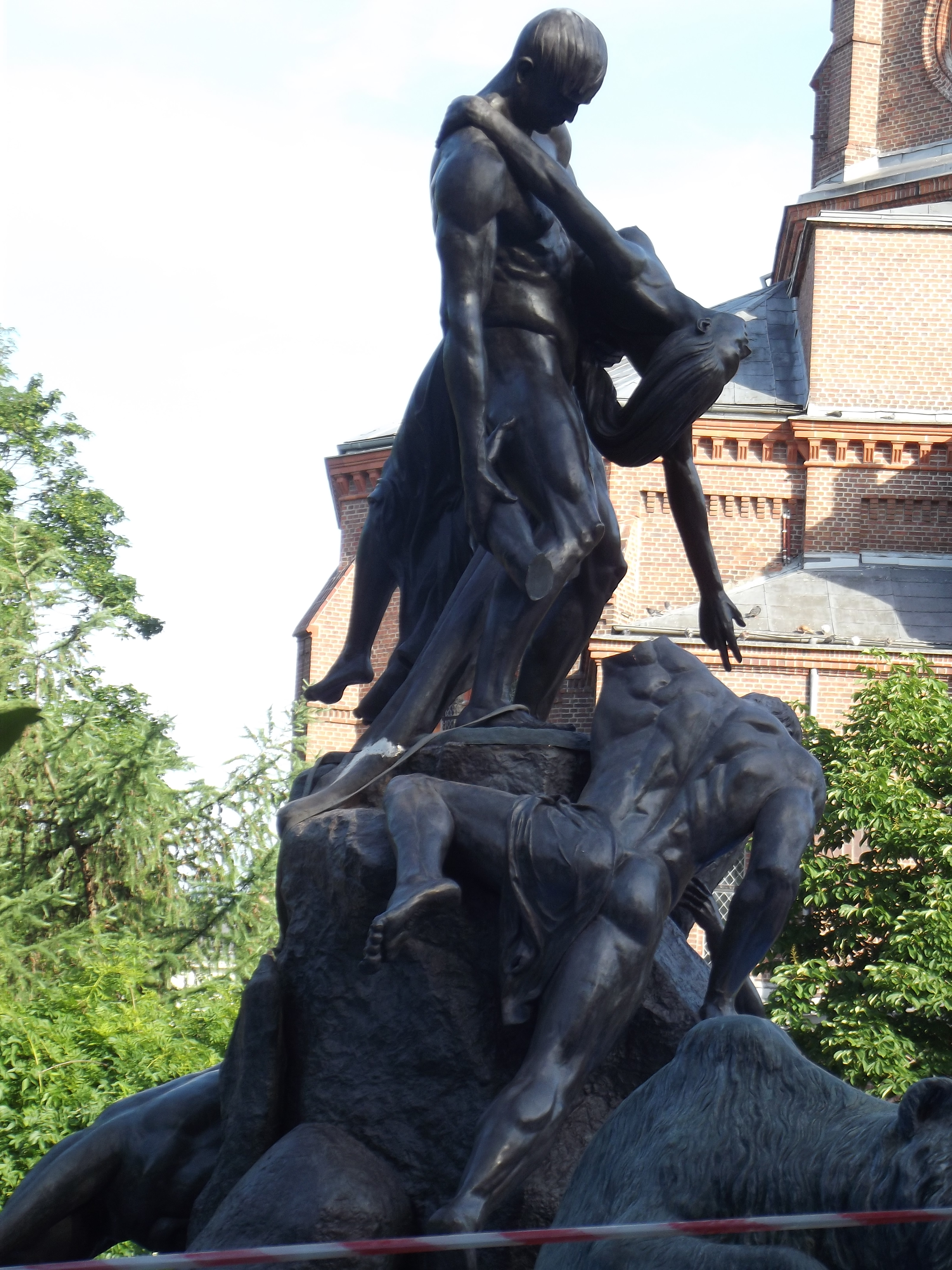 Fontanna Potop przez cały okres istnienia (1904-1943r.) dzieło to było jedną z atrakcji turystycznych Bydgoszczy. Obecnie od 2006 r. trwa rekonstrukcja. Zdjęcie przedstawia fontannę - rzeźbę w czasie ostatniej fazy rekonstrukcji na kilka dni przed uroczystym odsłonięciem pomnika.